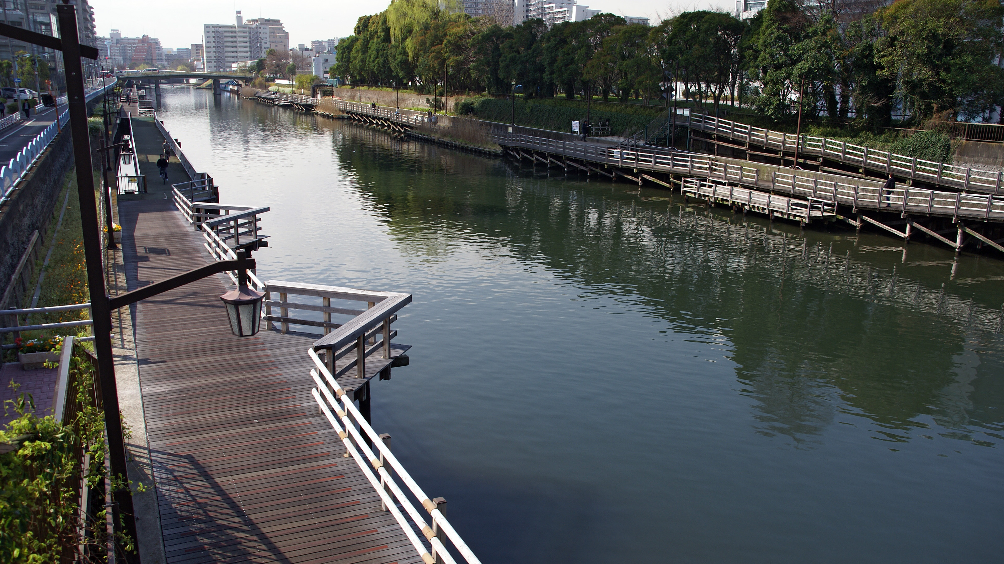 Yokojukken-gawa in Koto-ku, Tokyo, Japan